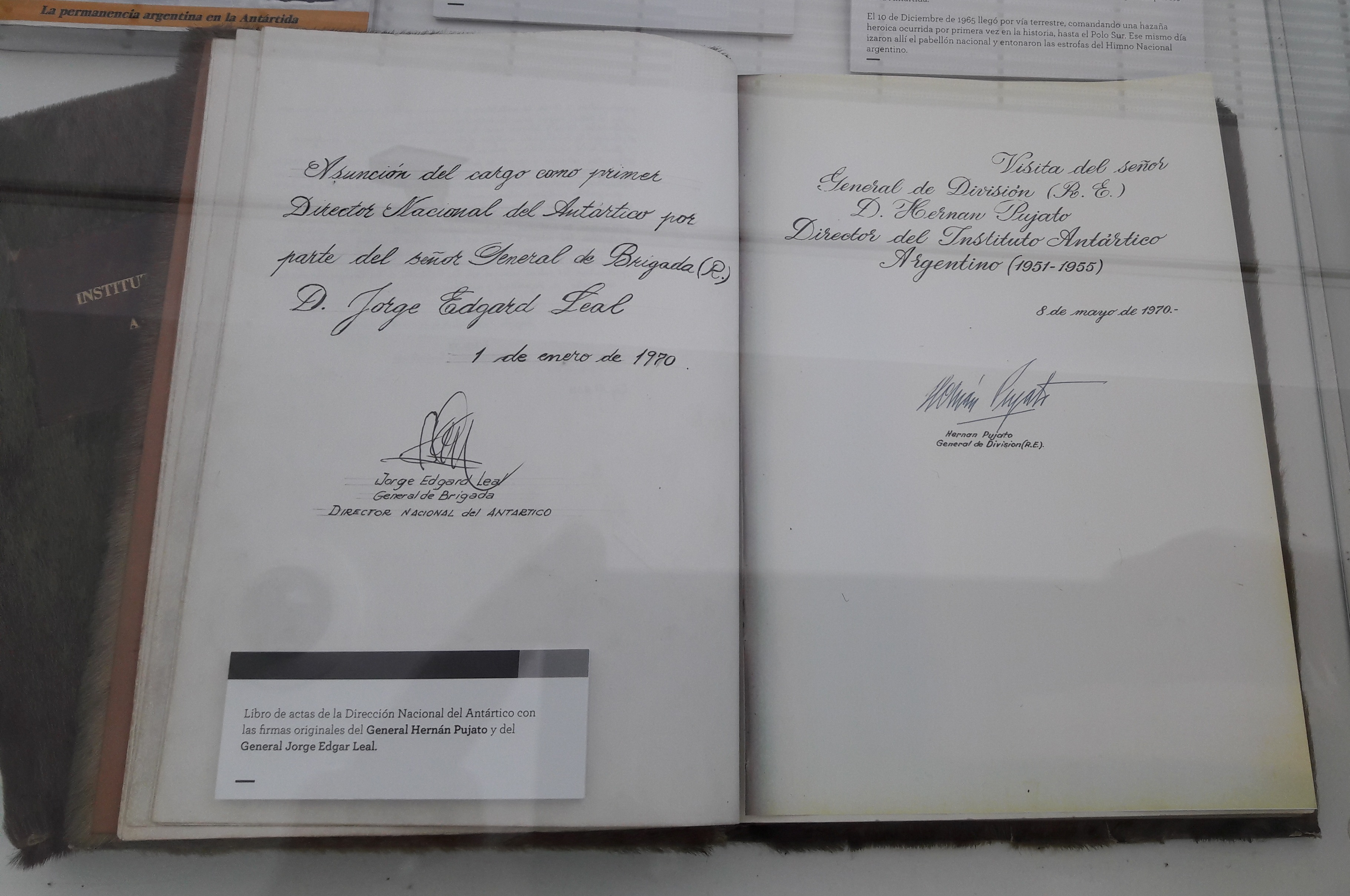 Libro de Actas de la Dirección Nacional del Antártico con las firmas originales de Jorge E. Leal y Hernán Pujato. Museo Malvinas, Núñez, Buenos Aires, Argentina.